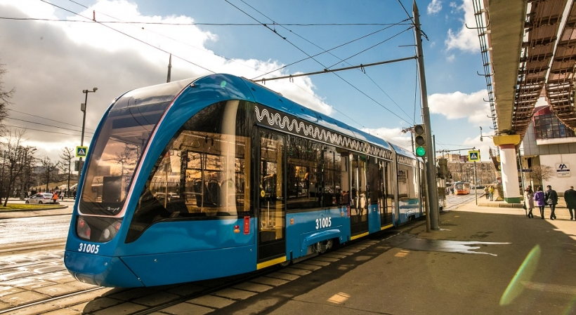 Трамвай 71-931М («Витязь-М») возле станции Московского монорельса Выставочный центр. Вид сзади